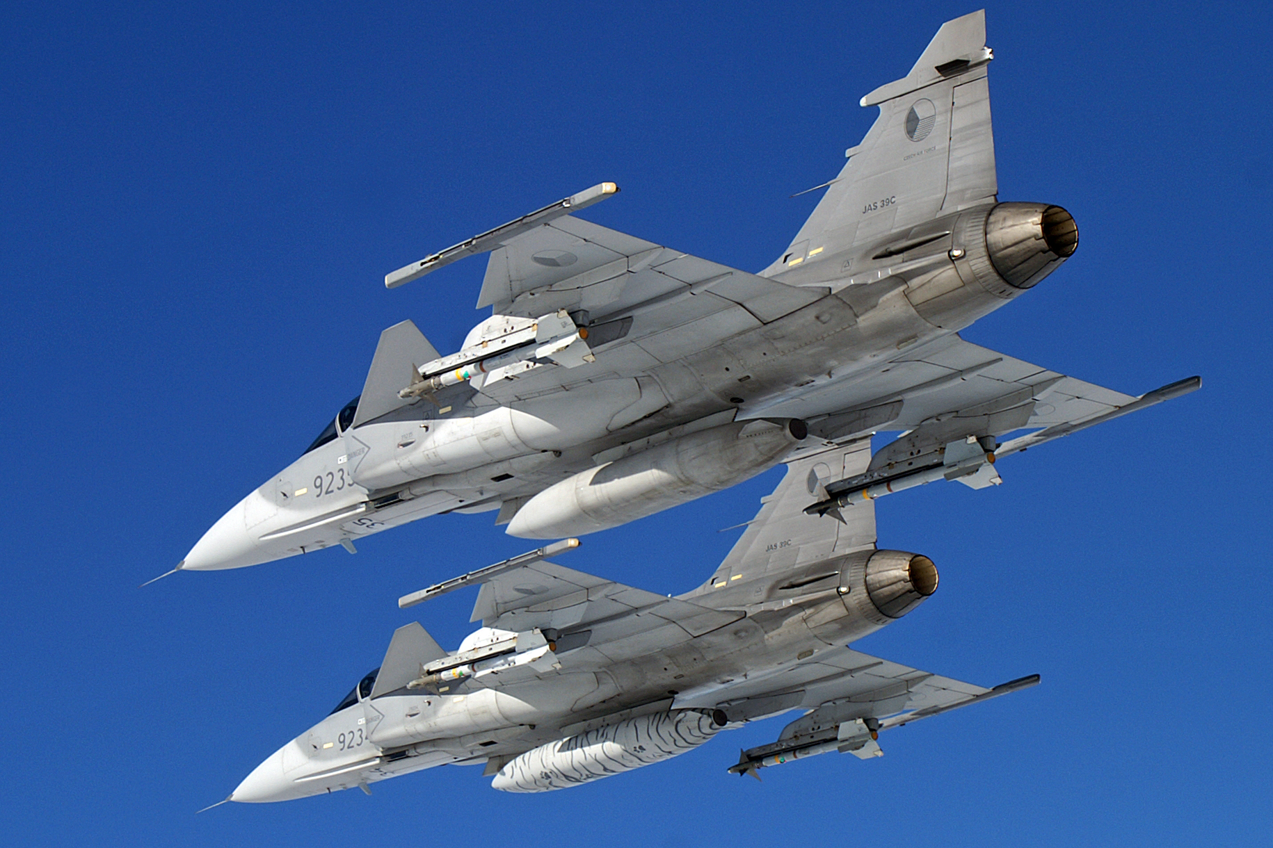 Saab JAS-39 Gripen (Czech Air Force)